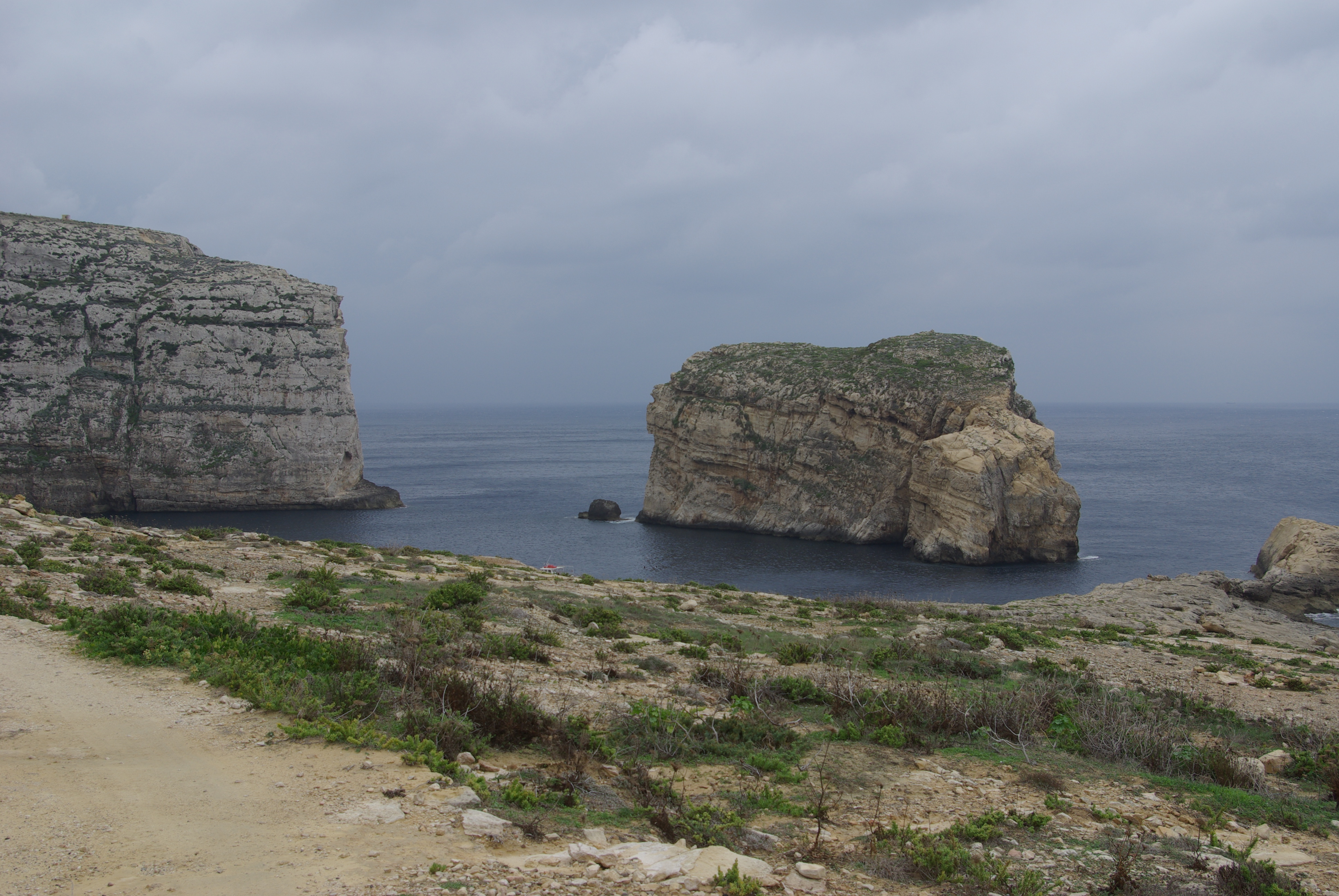 Fungus Rock in der Dwejra-Bucht auf Gozo